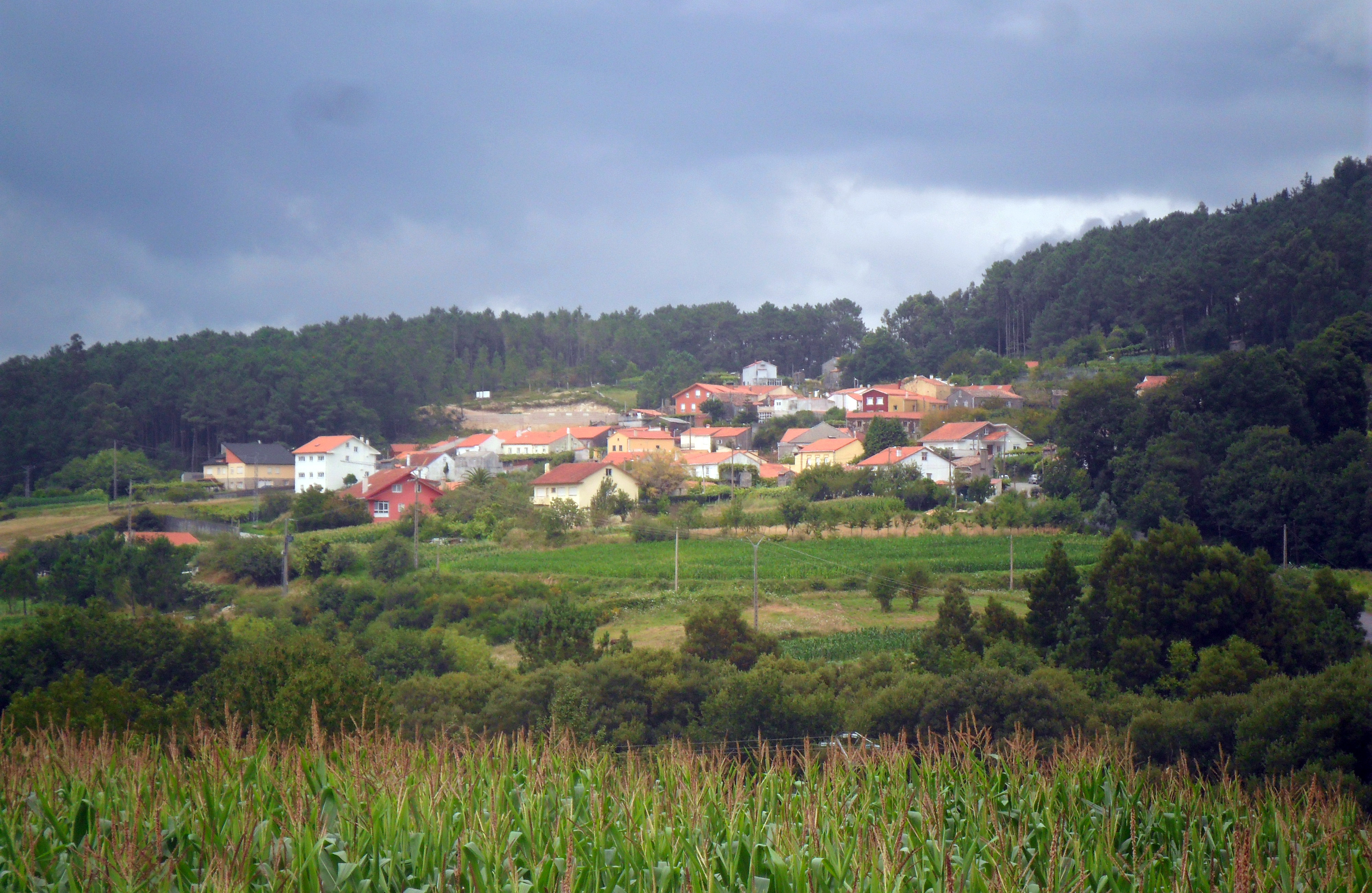 Localidad del municipio español de Lousame.